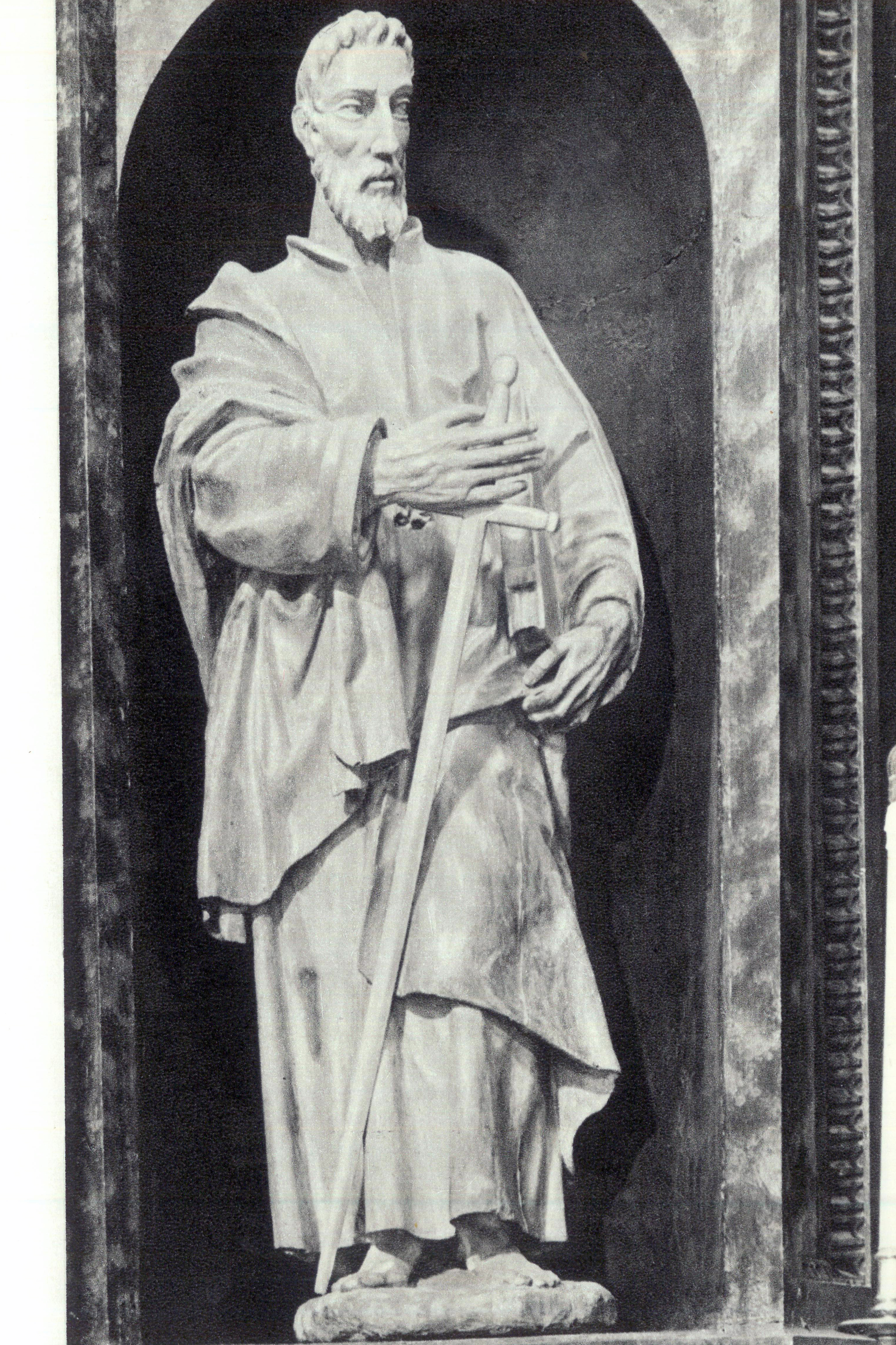 Situado en la fornícula izquierda del Retablo Mayor de la Iglesia del Hospital Tavera (Toledo) España